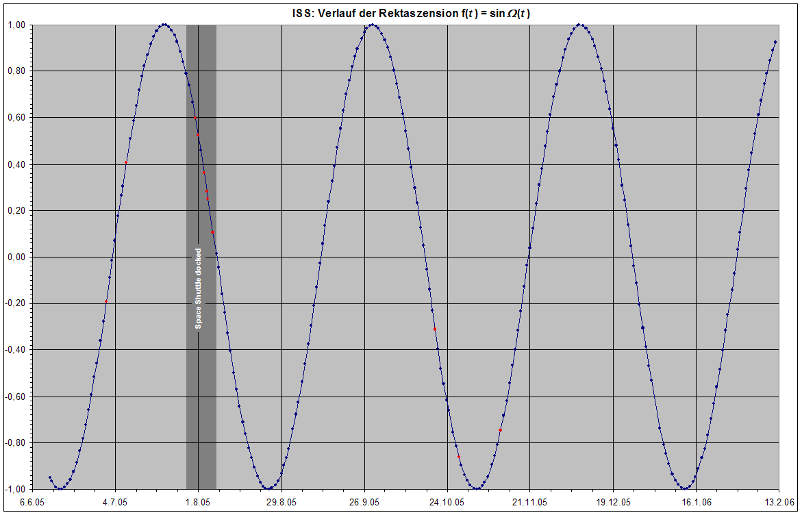 Internationale Raumstation: Verlauf der Rektaszension